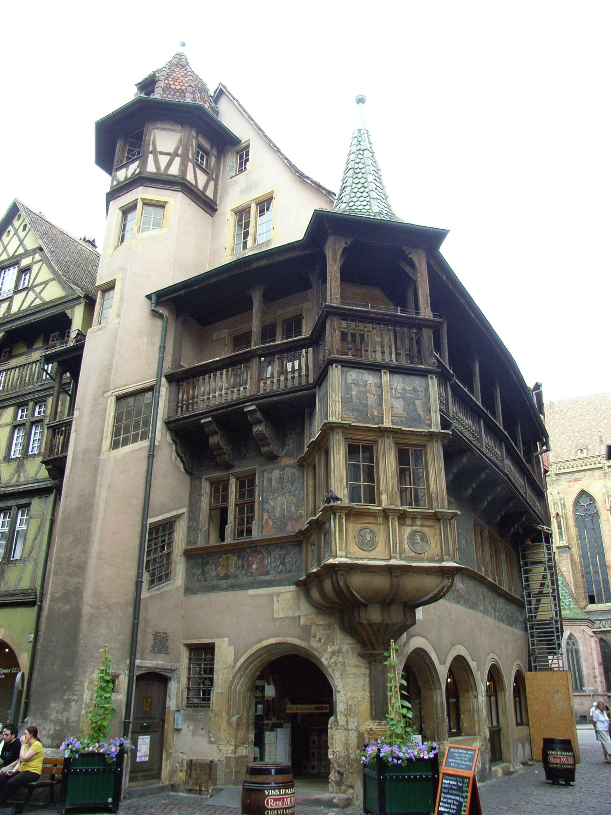 Dieses Bild zeigt das Pfister-Haus in Colmar.